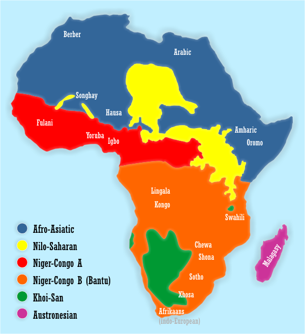 Map showing the distribution of African language families and some major African languages.